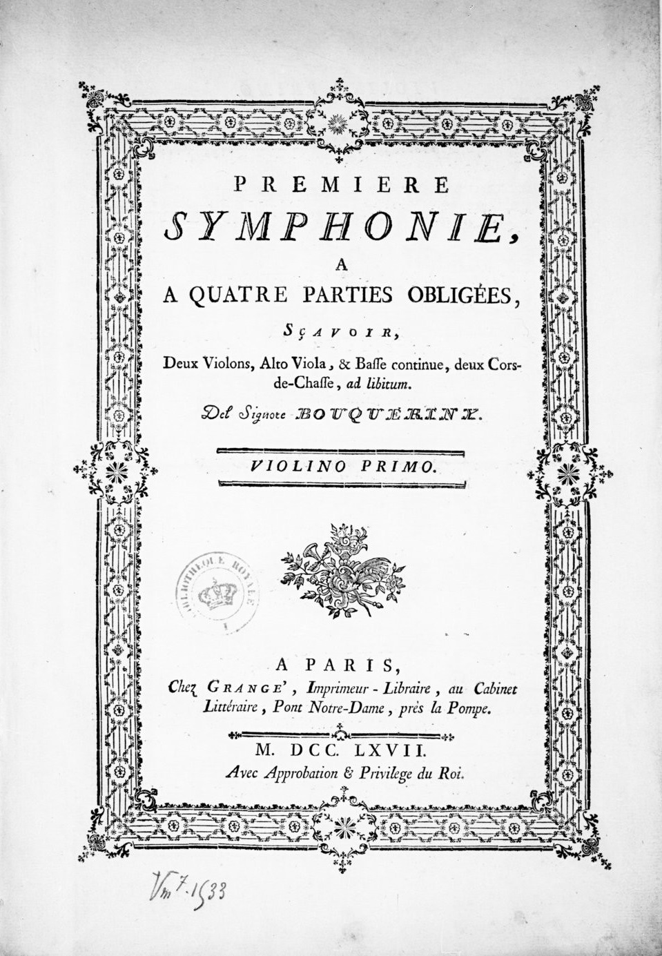 Première Symphonie à [sic] quatre parties obligées, sçavoir deux violons, alto viola et basse continue, deux cors de chasse ad libitum.... [G 500] de Luigi Boccherini.